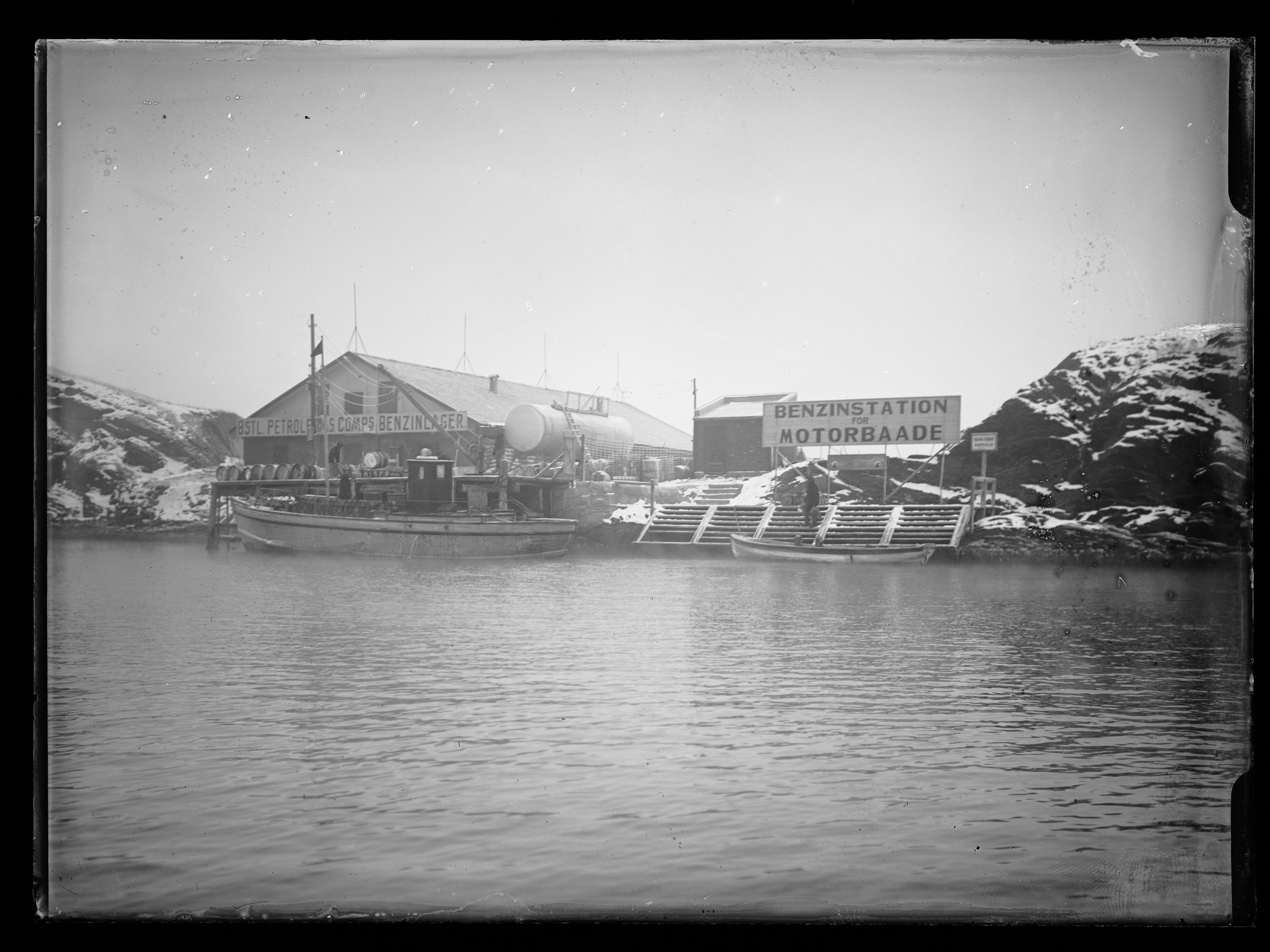 Bildet er hentet fra Nasjonalbibliotekets bildesamling. Anmerkninger til bildet var: Påskrift eske: Østlandske 1917 Oslo, Oslo